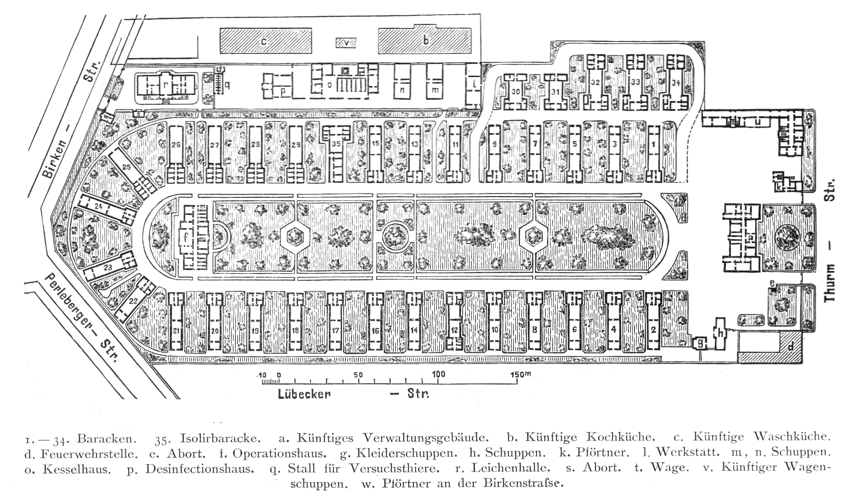 Berlin - Krankenhaus Moabit, Lageplan